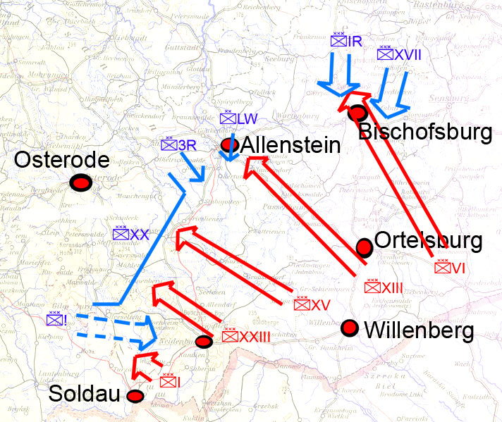 Situationen ved Tannenberg den 26. august 1914.